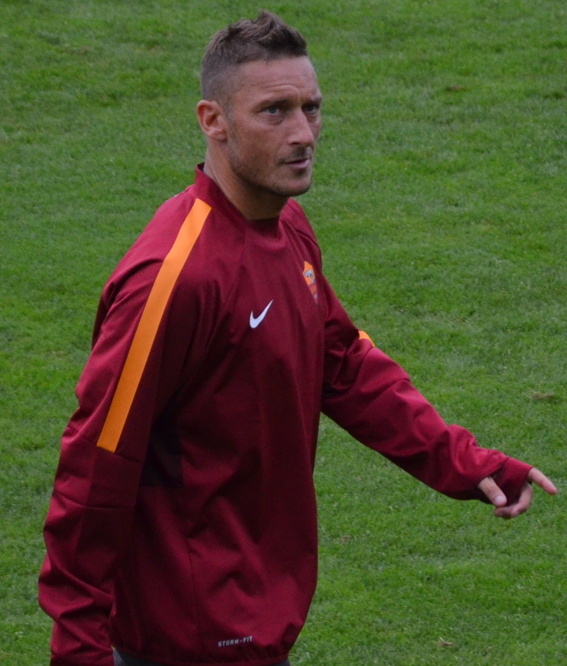 DSC_0681_totti